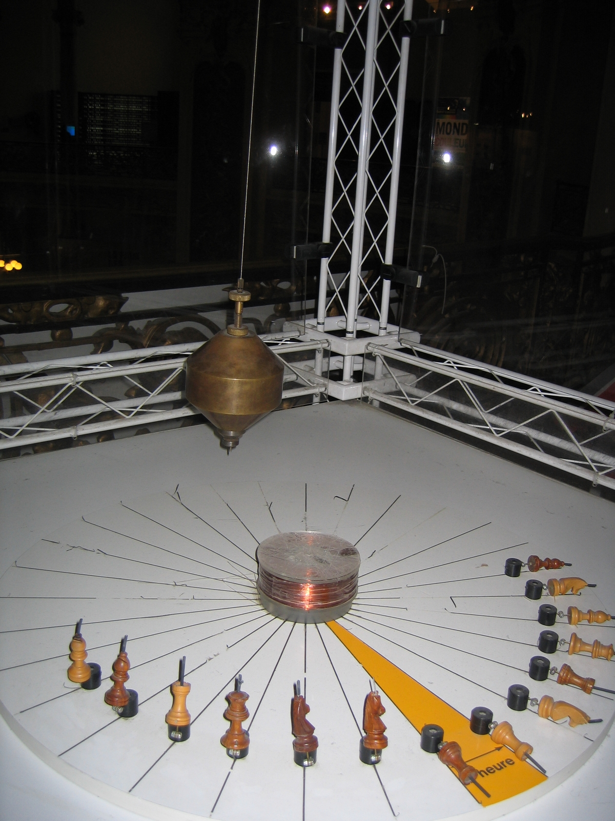 Pendule de Foucault au palais de la découverte